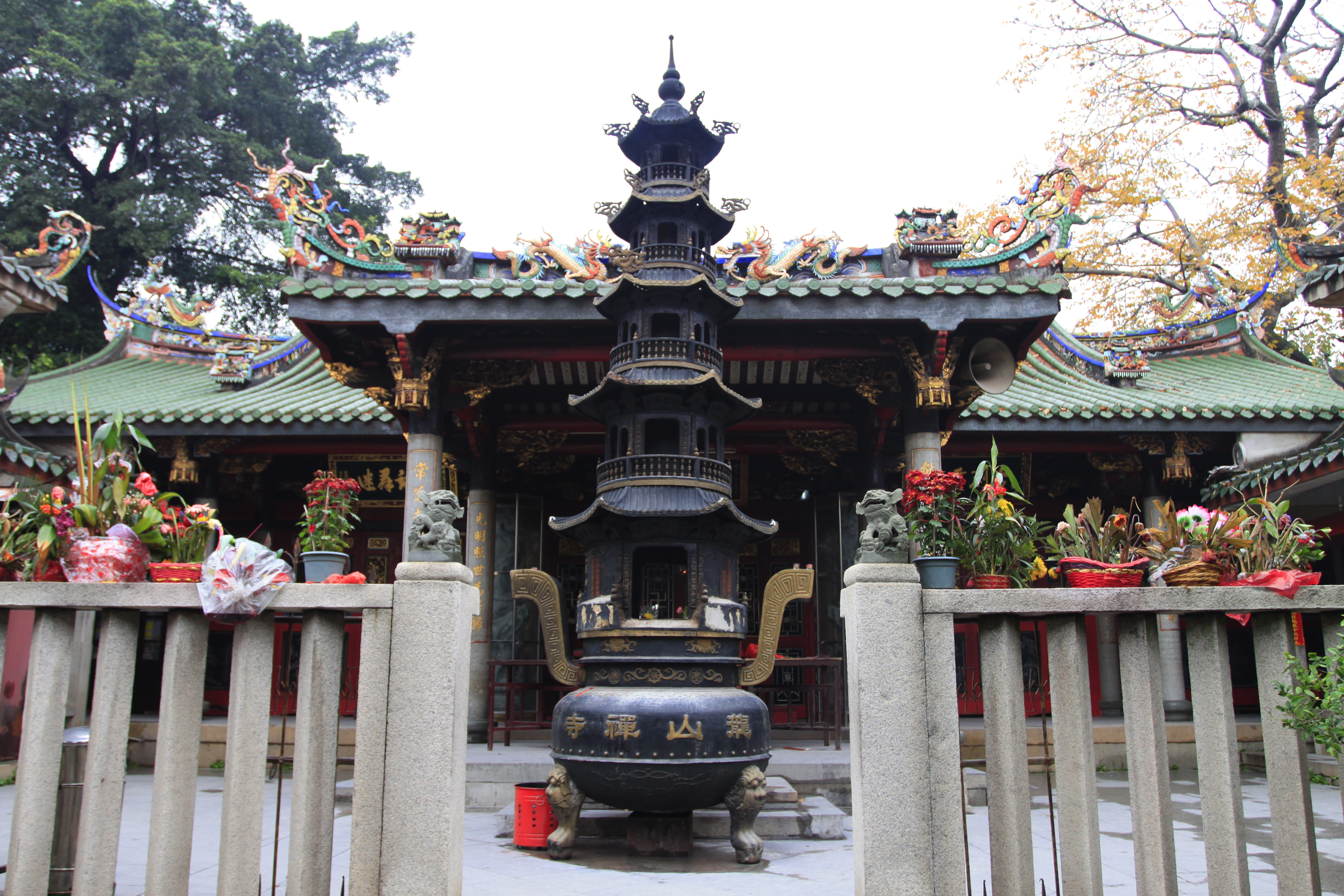 安海龙山寺，位于中国福建省晋江市安海镇。